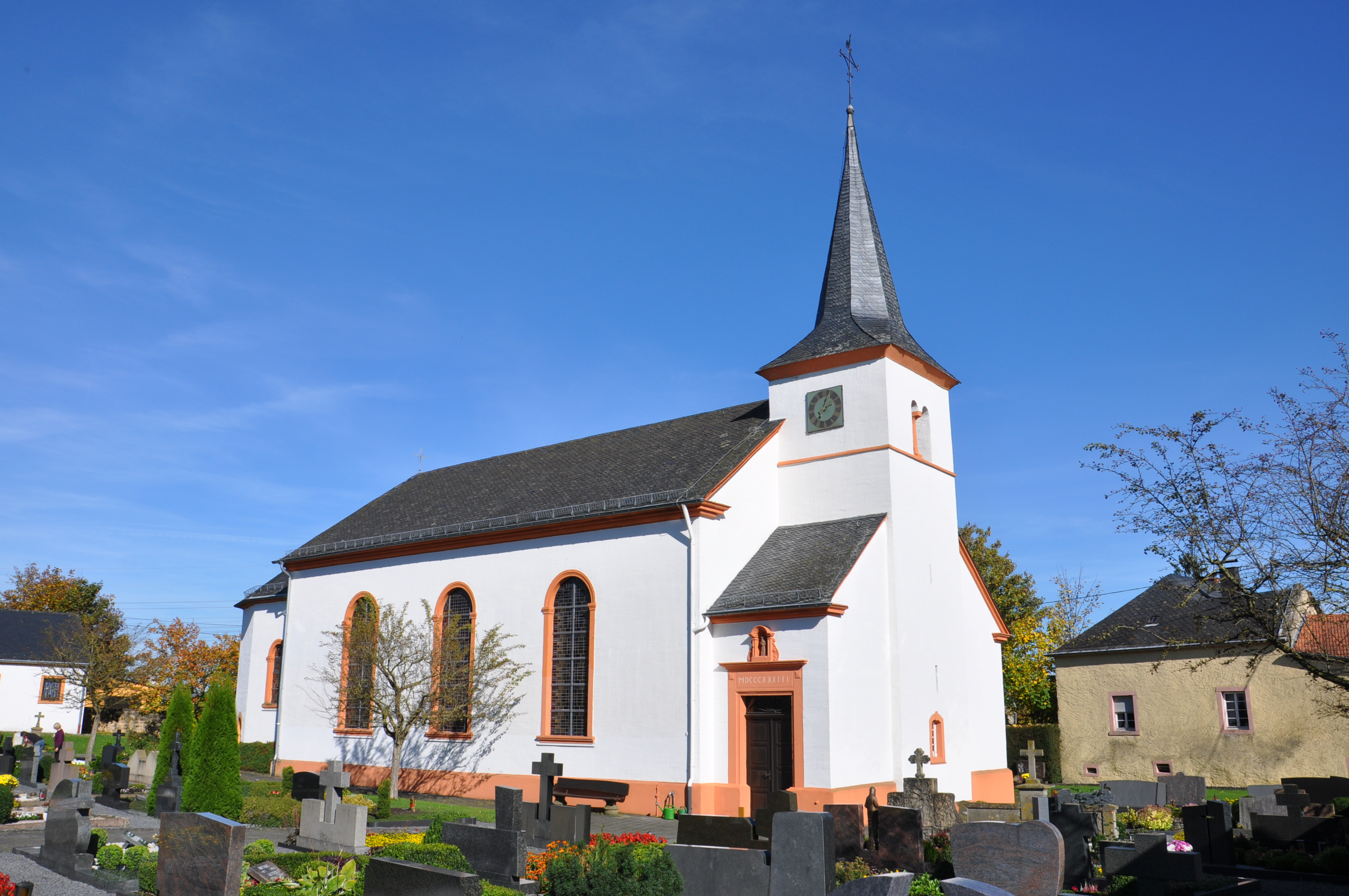 Dockendorf, St. Martin